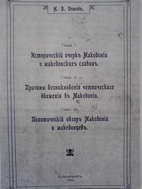 Корица на "Исторический очерк Македонии" на Наце Димов